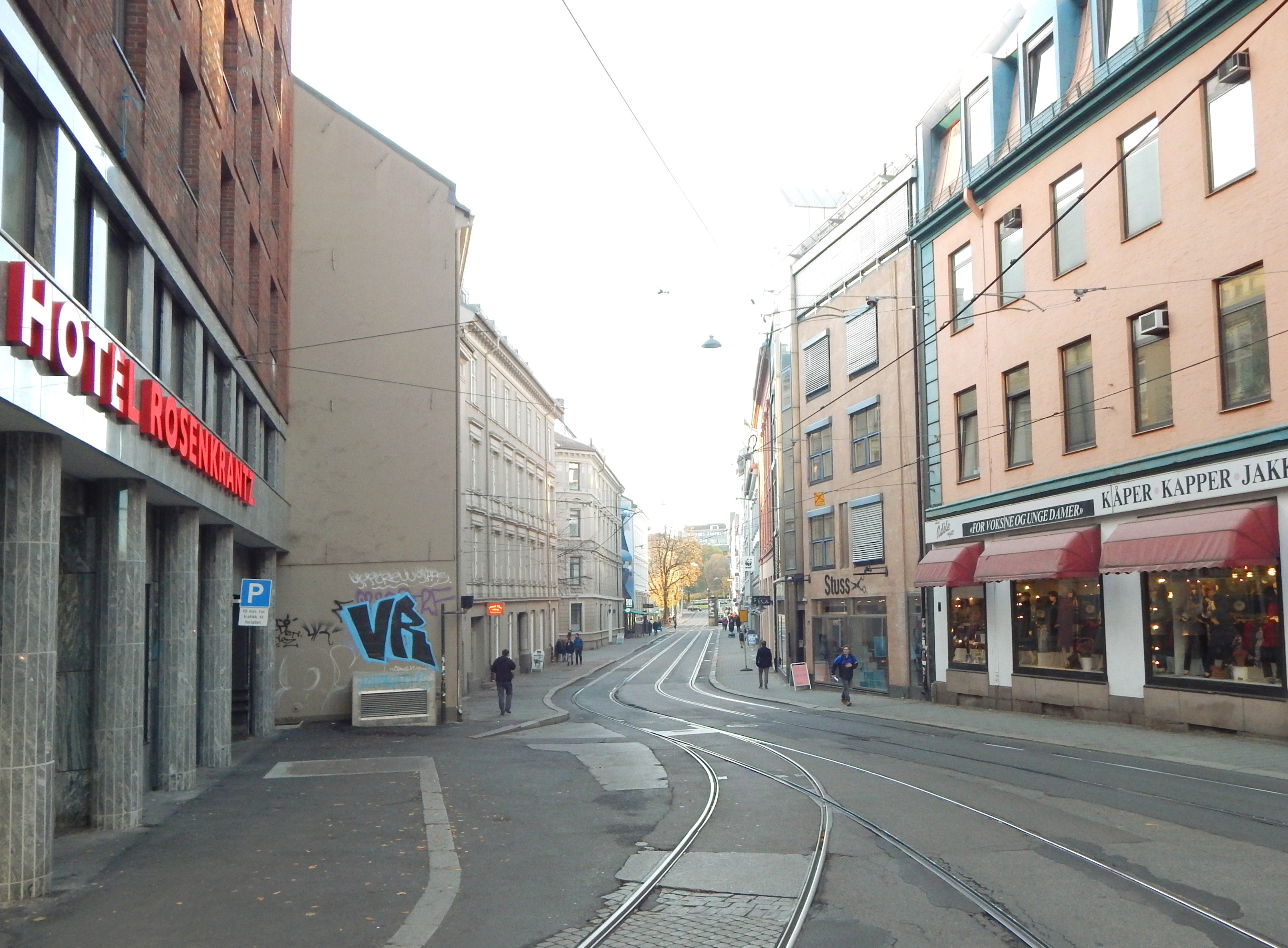 Kristian Augusts gate sett fra C.J. Hambros plass